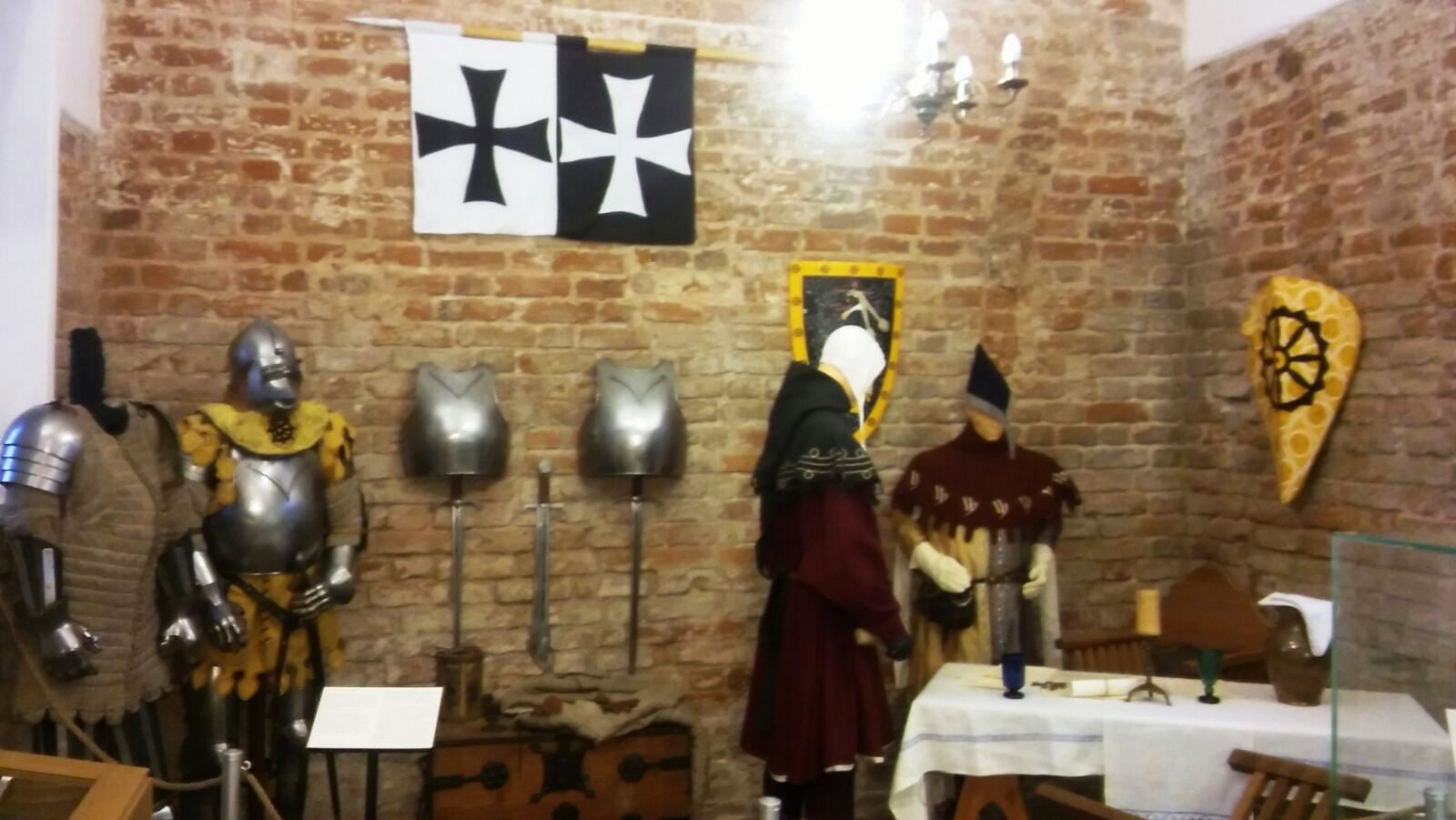 Wieżą Klesza, Muzeum Ziemi Braniewskiej, chorągiew braniewska, 16 listopada 2017 otwarto kolejną wystawę „W przededniu wielkiej wojny 1409–1410”